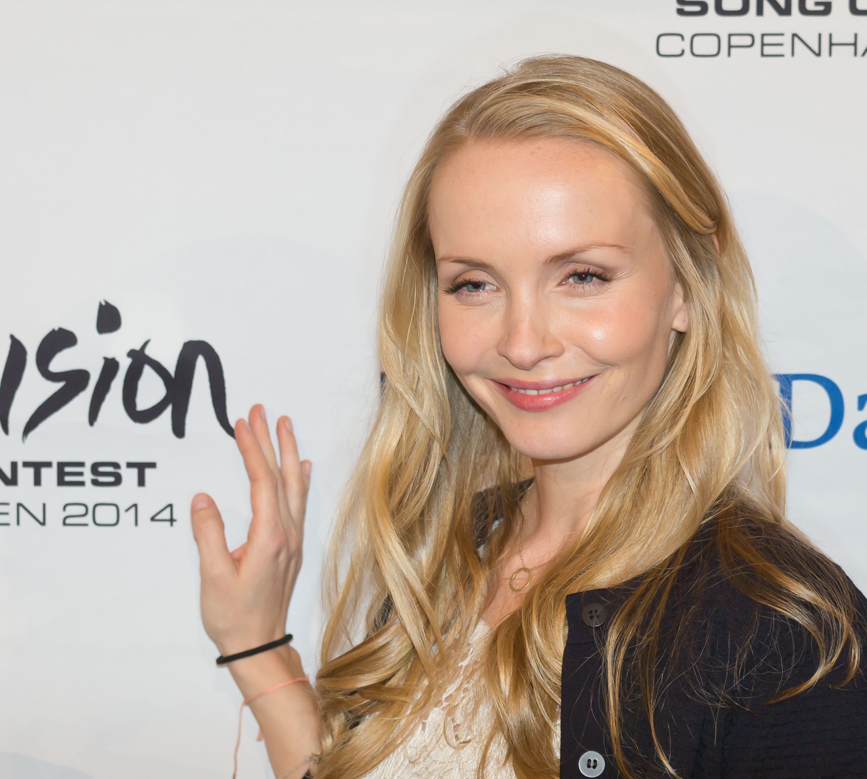 Pressekonferenz am 2. Probentrag von "Unser Song für Dänemark" mit allen 8 Acts Foto: Moderatorin Janin Reinhardt